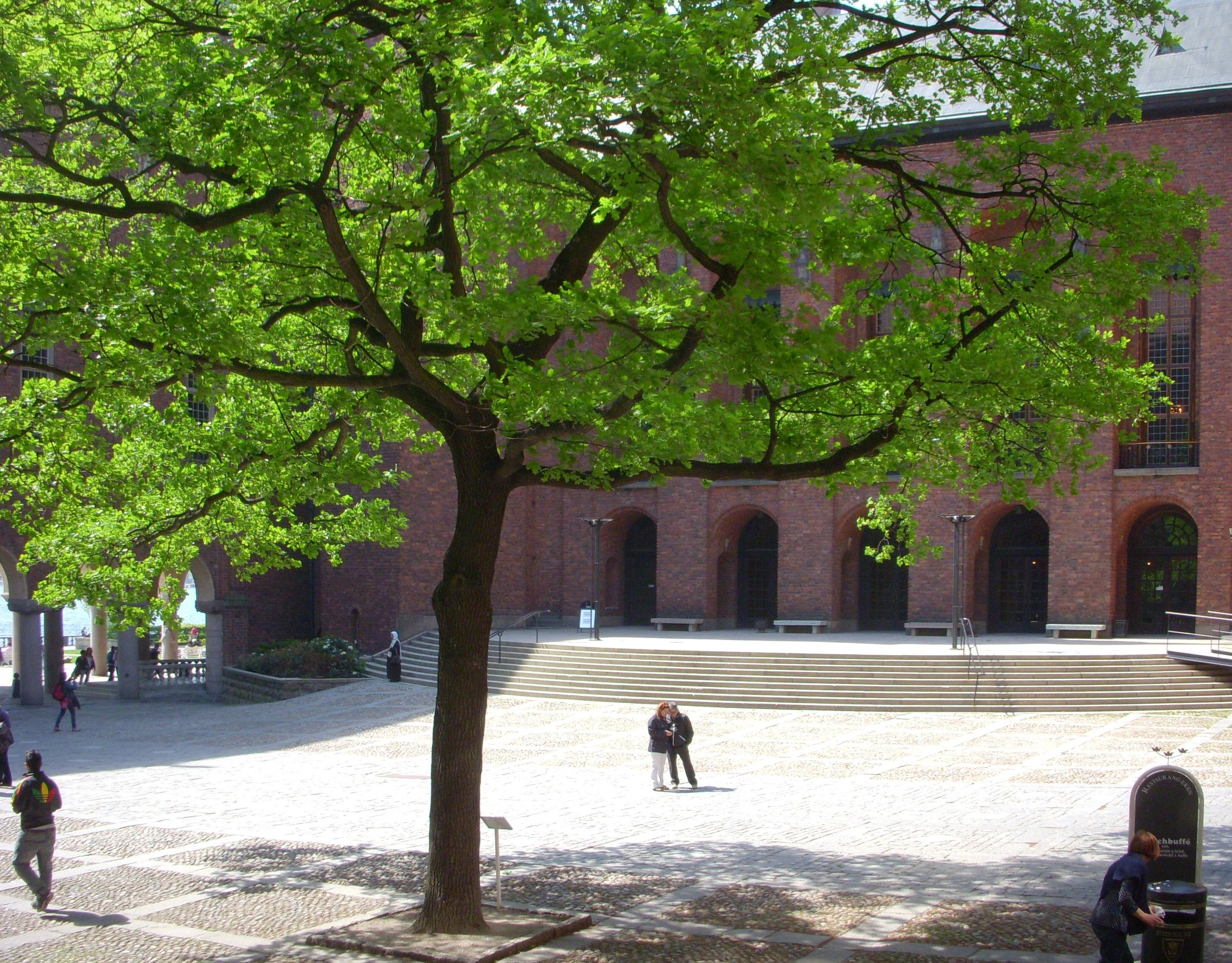 Globträdet på Stockholms stadshus' borgargården